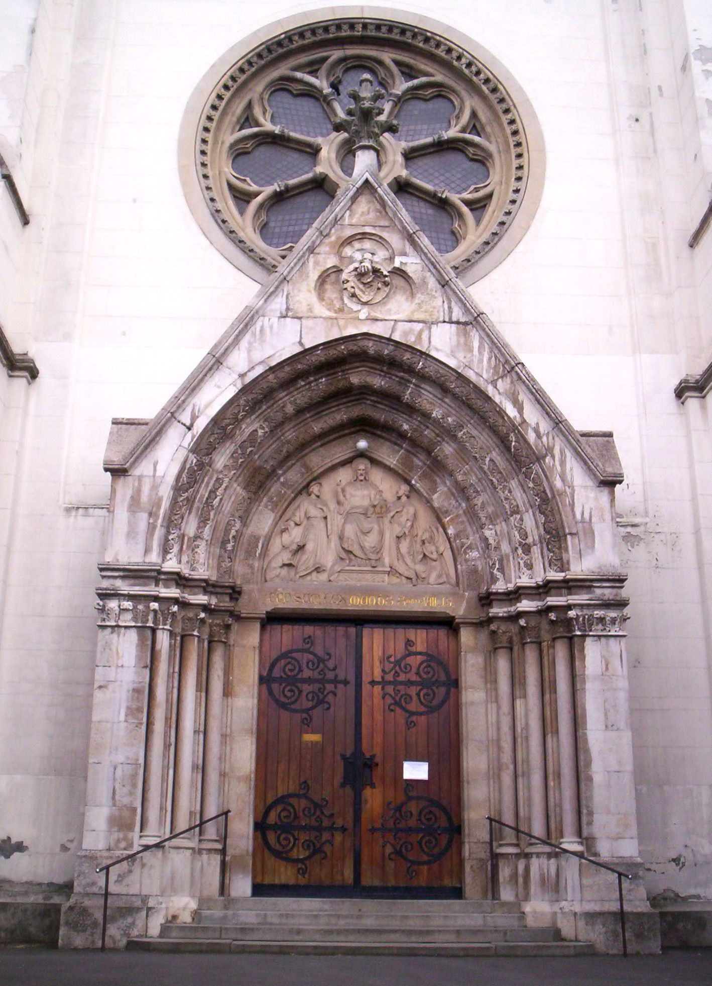 A szegedi Szent Rókus-templom főkapuja. A kaput a Szent Rókus és Szent Péter Krisztus előtt című dombormű díszíti. A neogótikus templom 1909-ben épült, Aigner Sándor és Rainer Károly tervei alapján. – photo taken by uploader User:Csanády in 2006.